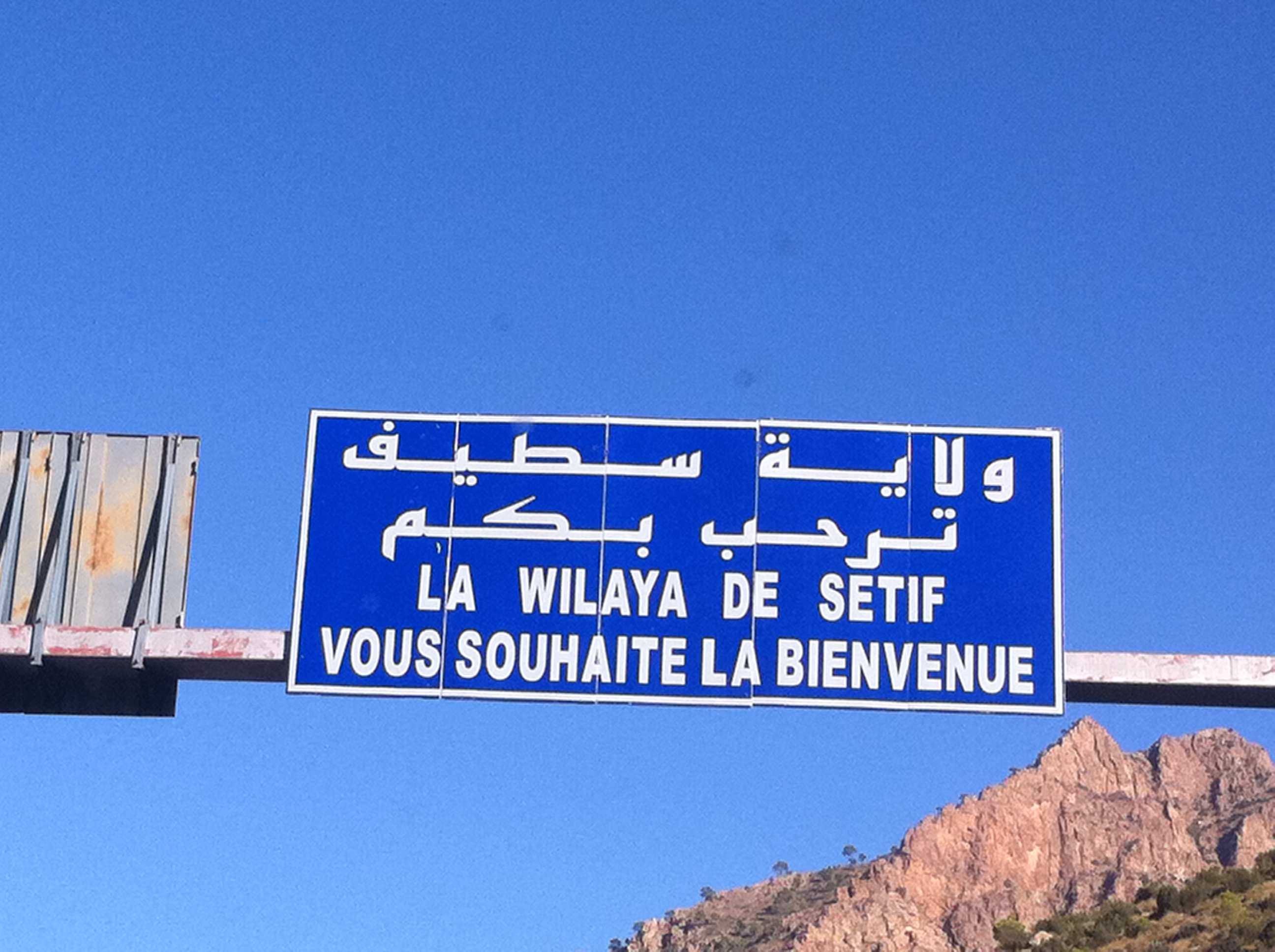 Frontière entre la wilaya de Setif et Msila